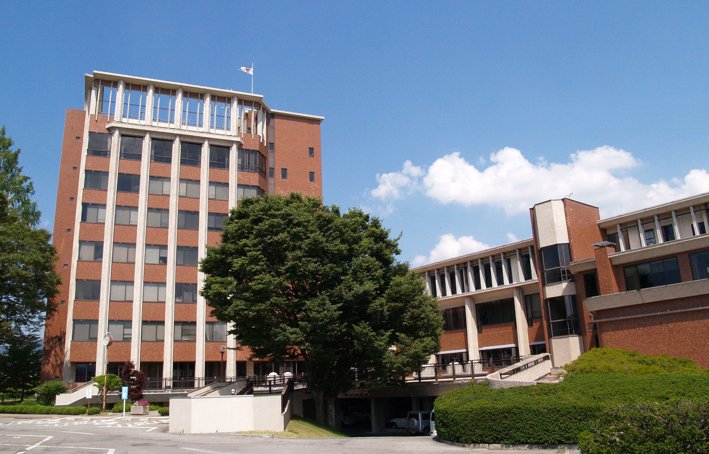 佐久市役所